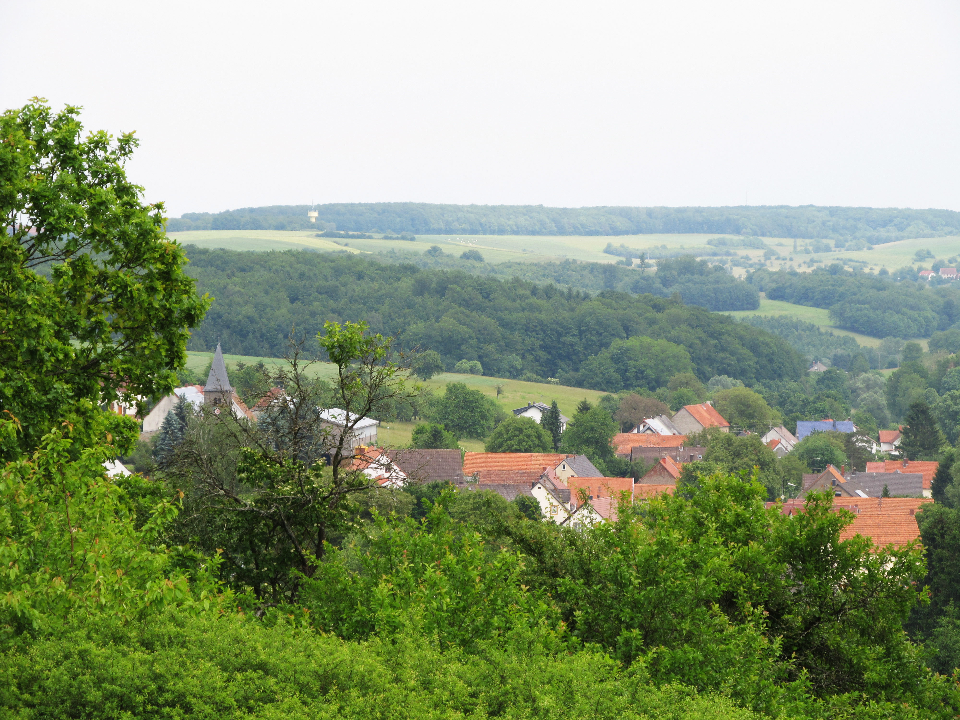 Blick auf Brenschelbach, Saarland